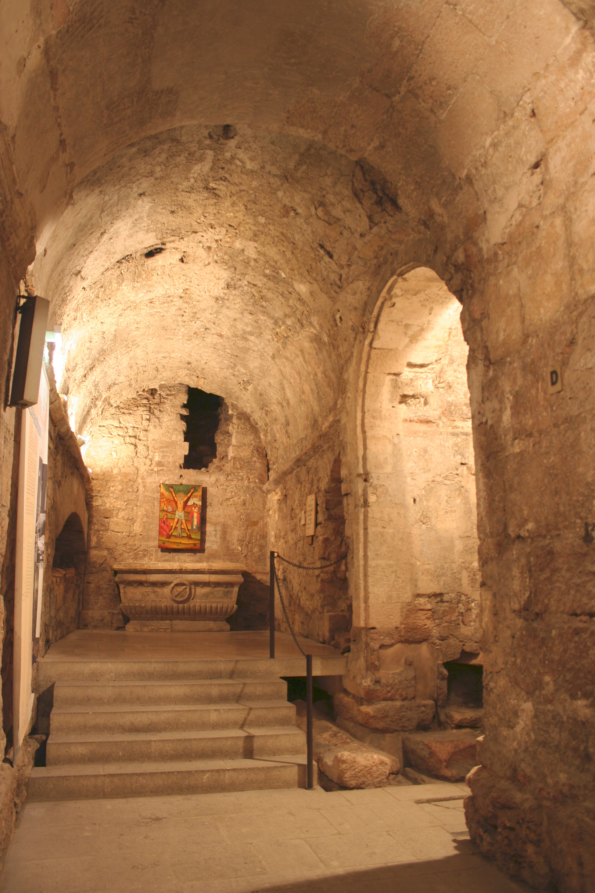 Chapelle Saint André dans les cryptes de l'abbaye de Saint Victor à Marseille.